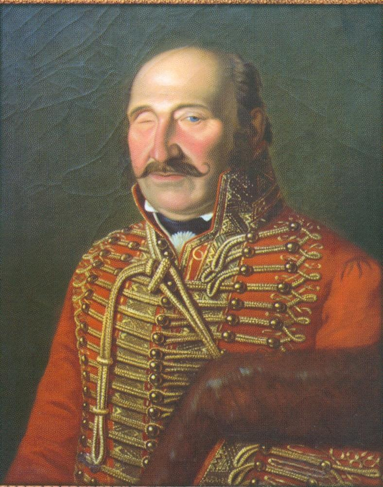 Vay Miklós magyar hadmérnök, műszerkészítő, dandártábornok, mecénás, utazó, országgyűlési követ, császári és királyi kamarás.